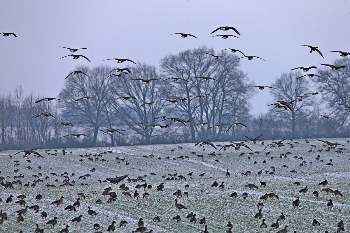 Gänse in Südmecklenburg